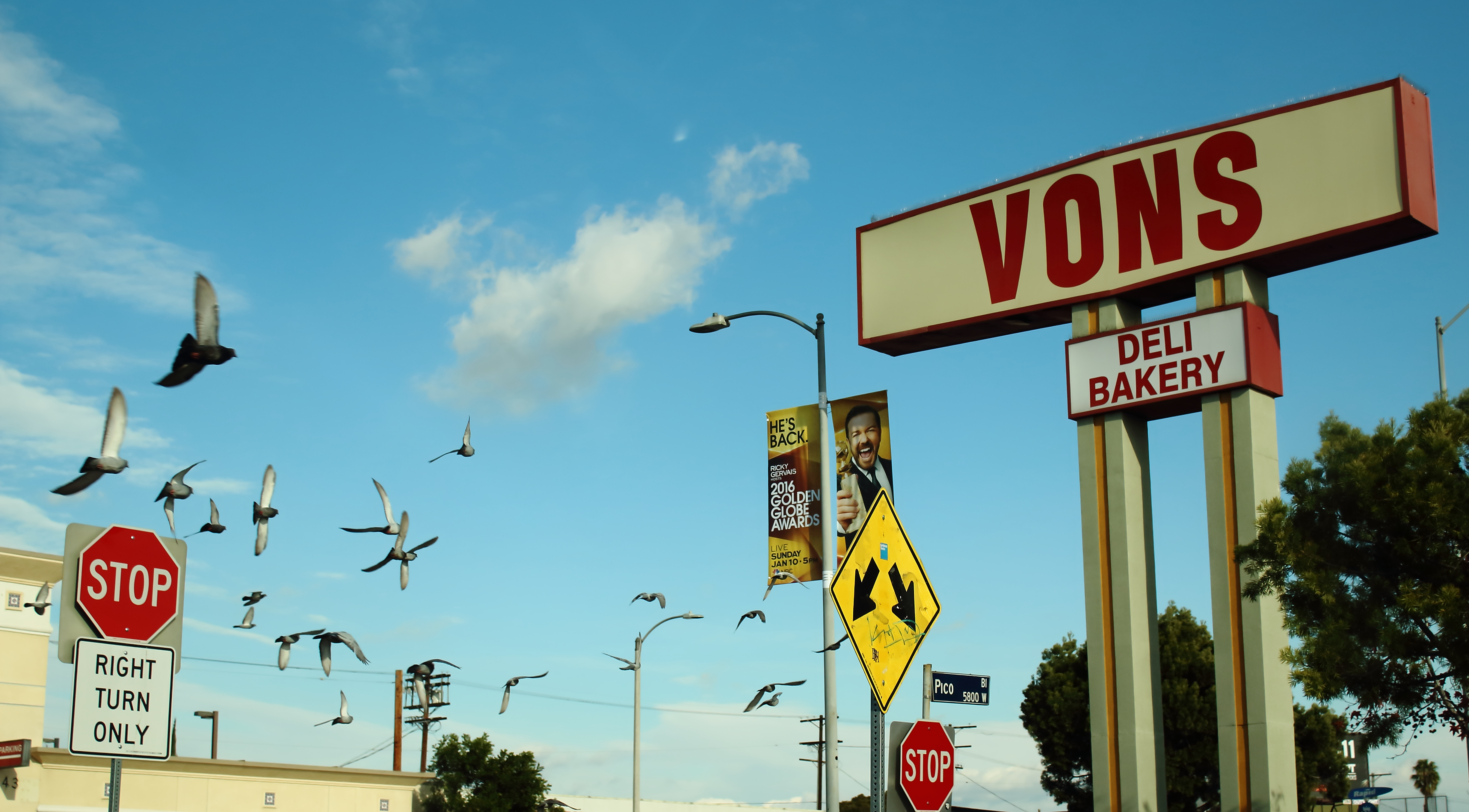 Supermercado Vons en California.